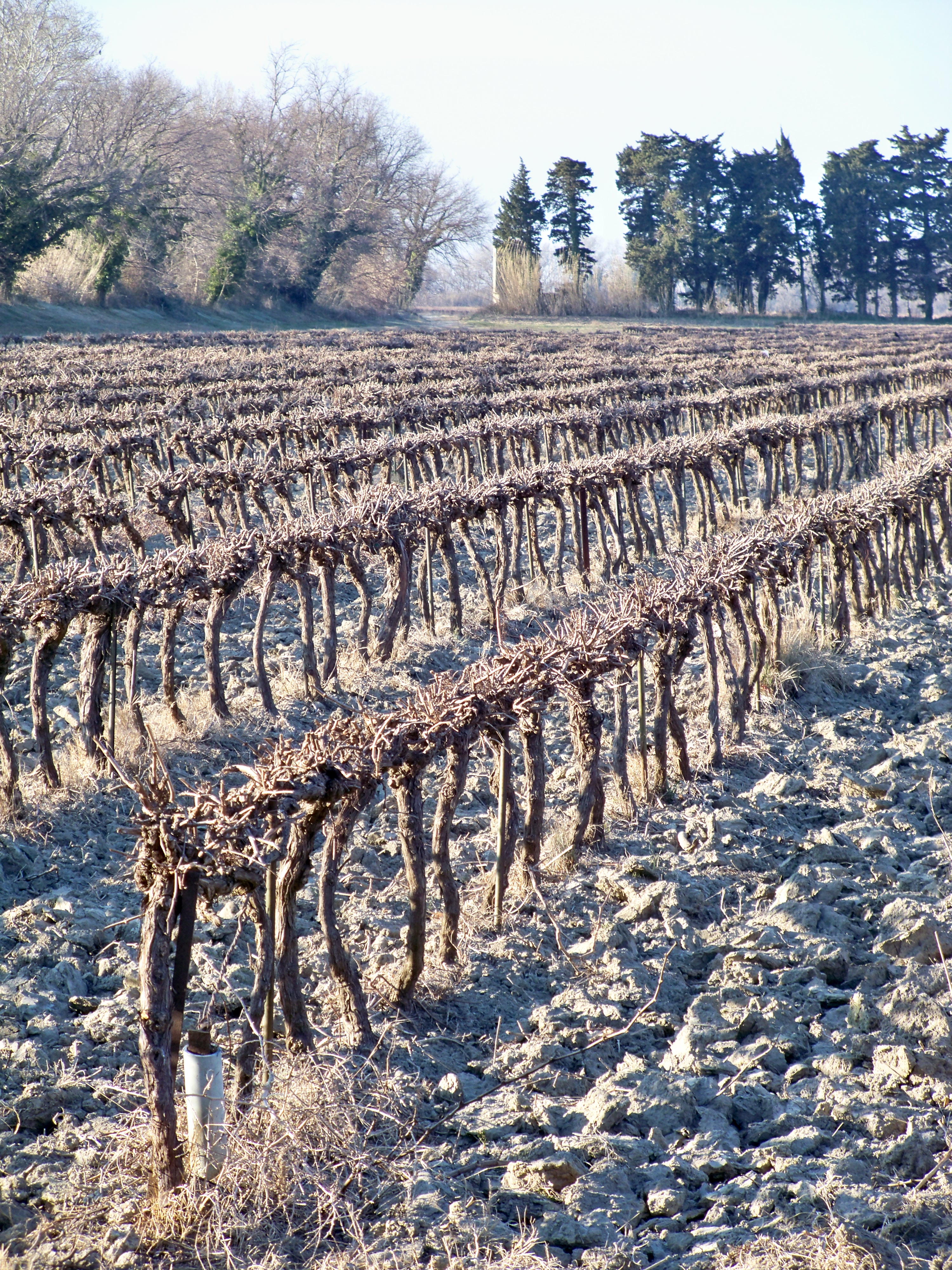 Domaine de l'Isle Saint Pierre, Mas de Thibert, commune d'Arles (13)